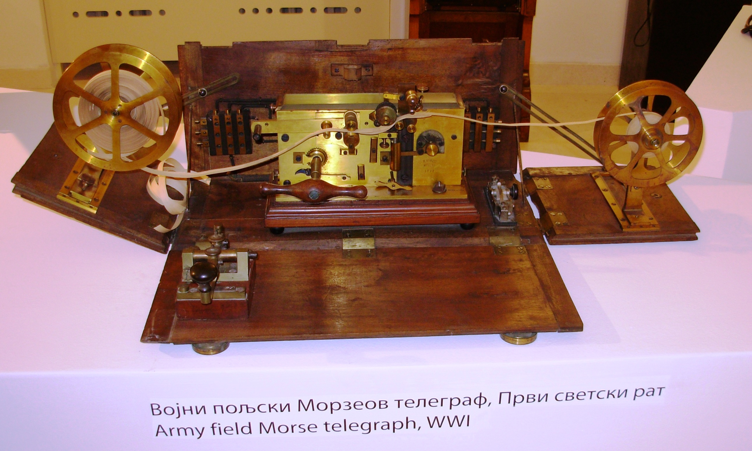 Vojni poljski Morzeov telegraf - stalna postavka u Muzeju PTT-a, ulica Majke Jevrosime, Beograd. Slikao Goldfiger